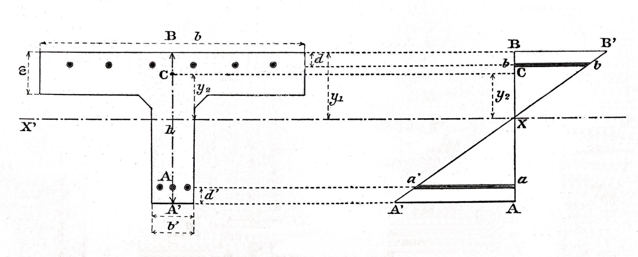 Commission du ciment armé : Hypothèse de Navier